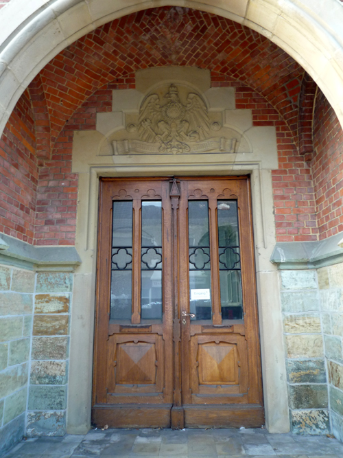 Amtsgericht Rheda-Wiedenbrück, altes Eingangsportal